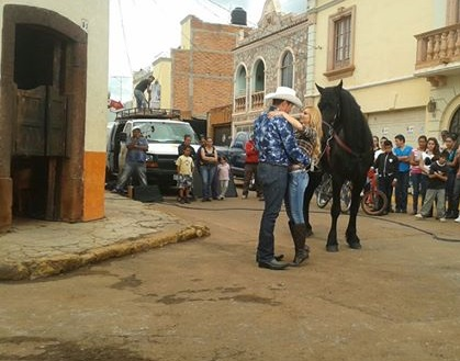 Durante la filmación de «Hermosa experiencia»